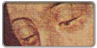 Marijos akys